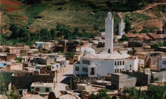 Vue sur la ville de Beni Snous, région berbérophone dans la wilaya de Tlemcen (Algérie).